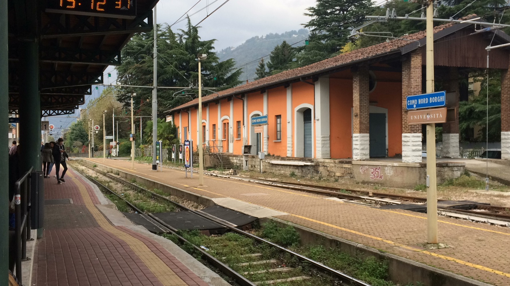 I binari della stazione di Como Nord Borghi